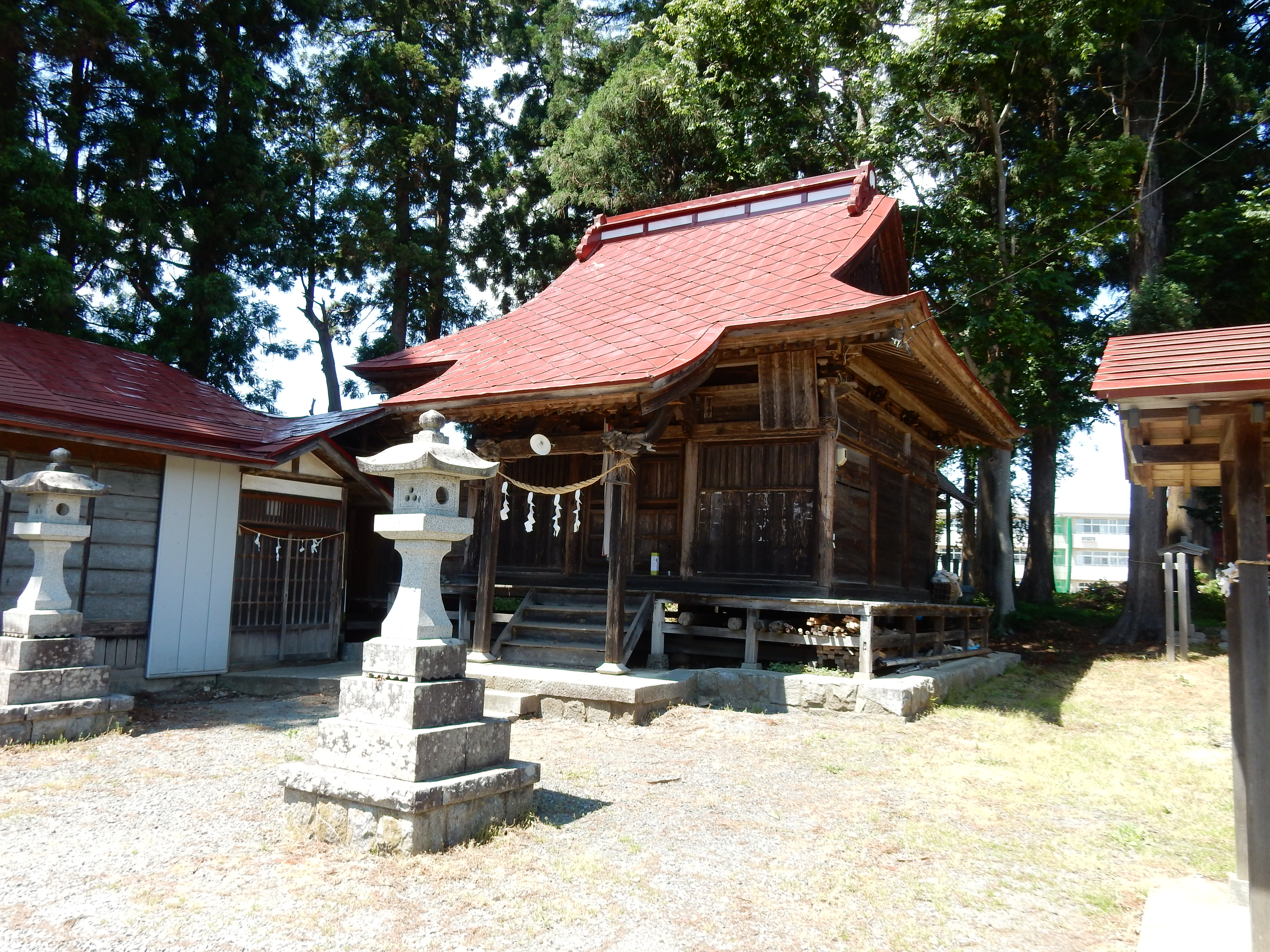 岩手県紫波町日詰字箱清水にある樋爪館跡の薬師神社(明治の廃仏毀釈により薬師堂→薬師神社へ)神社内には当時の薬師如来像があると言うが今は御神体なので見られないとの事。